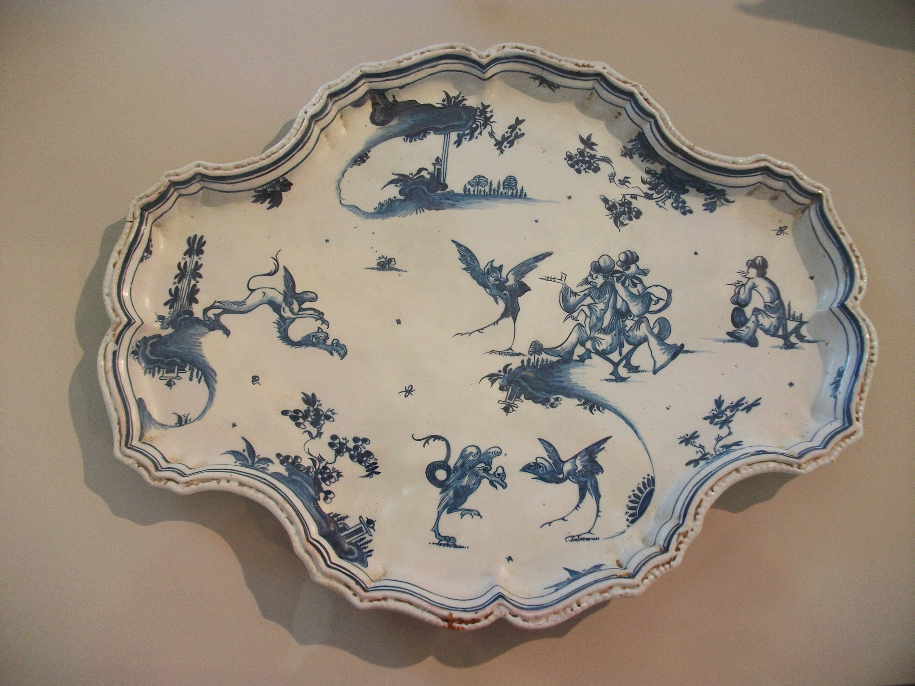 Safata de pisa, Museu de Ceràmica de València, ceràmica de l'Alcora. Entre 1727 i 1750.